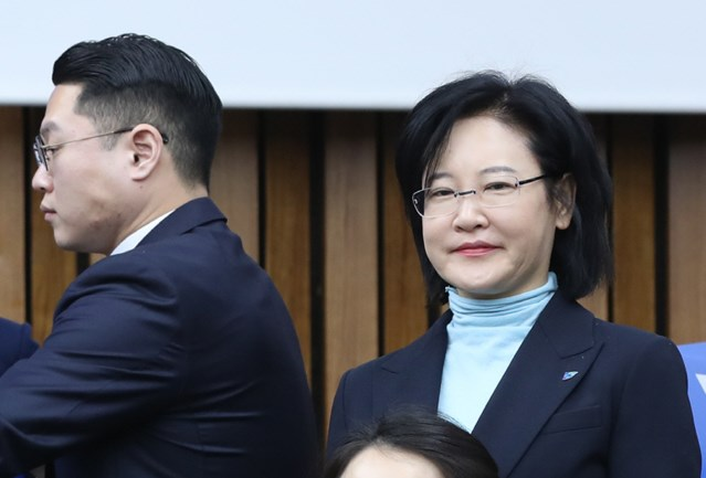 이수진의원